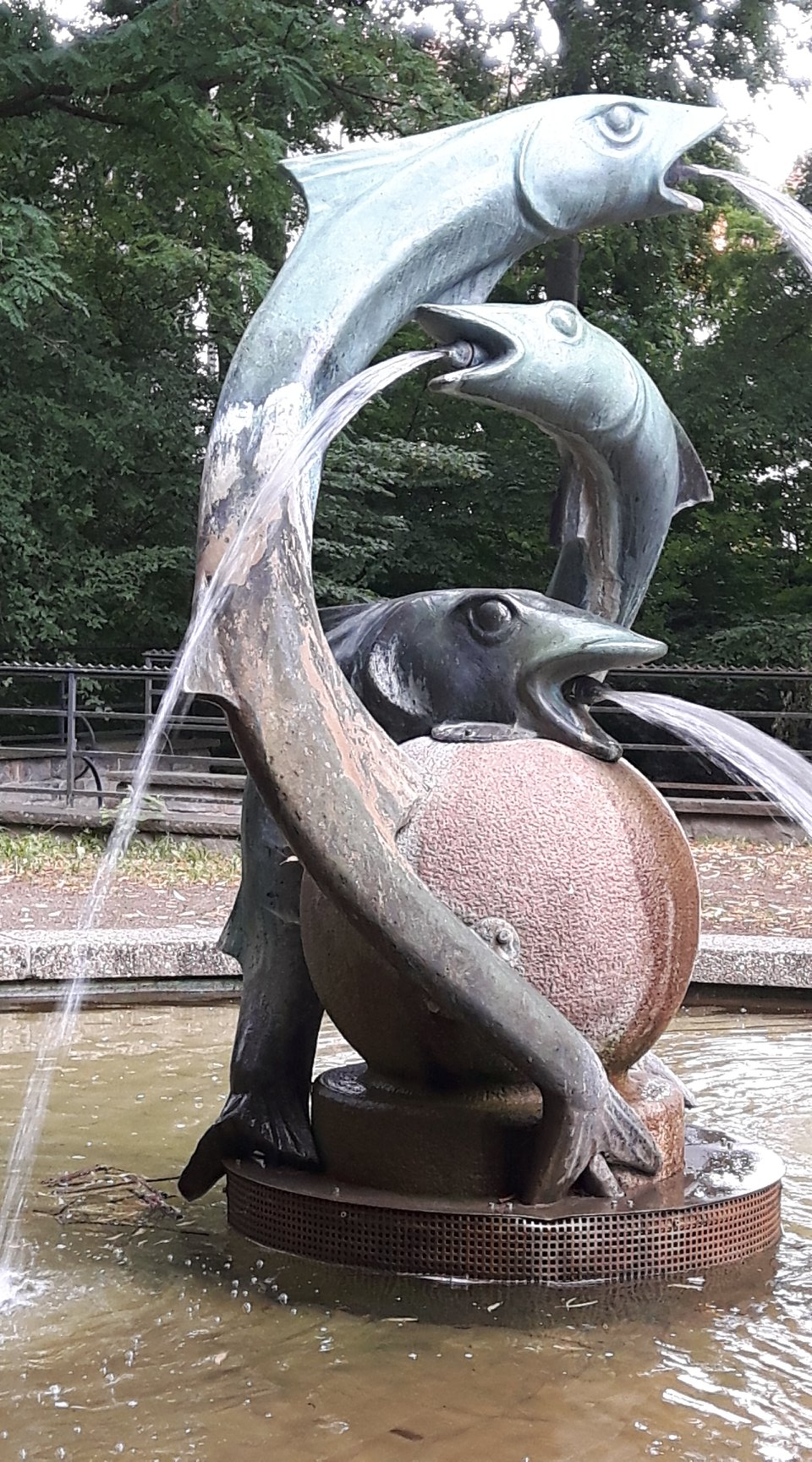 Eine Nahaufnahme des Arthur-Menge-Brunnens in Hannover